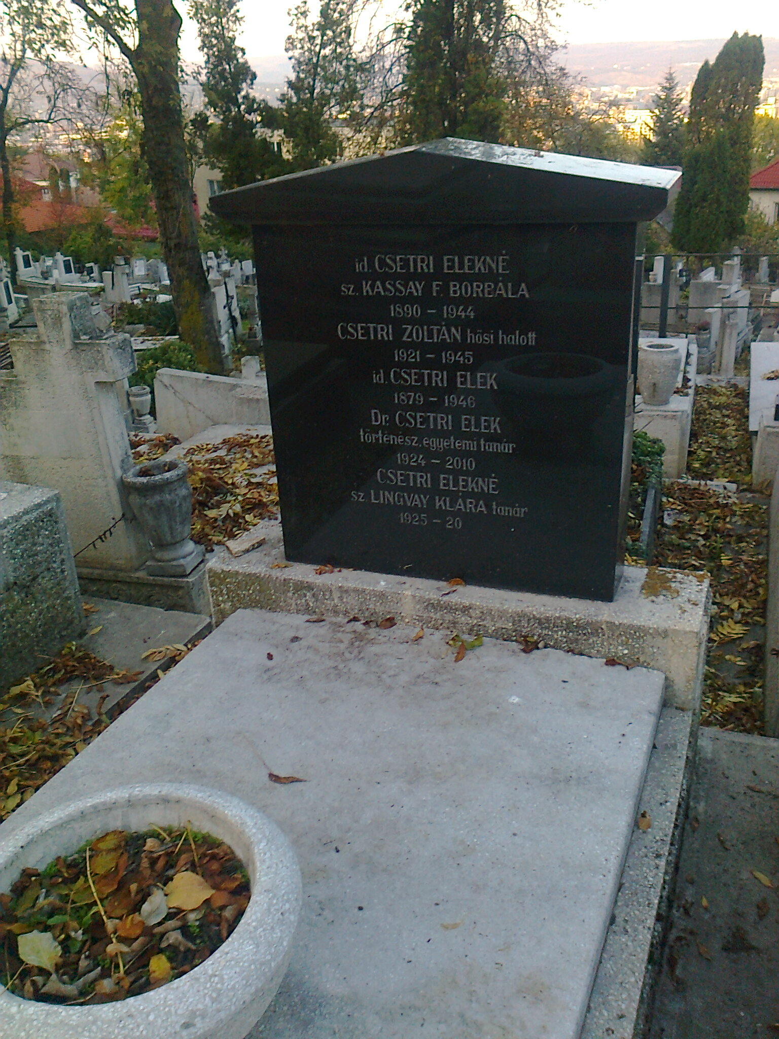 Csetri Elek történész sírja a Házsongárdi temető új részében, Kolozsvár